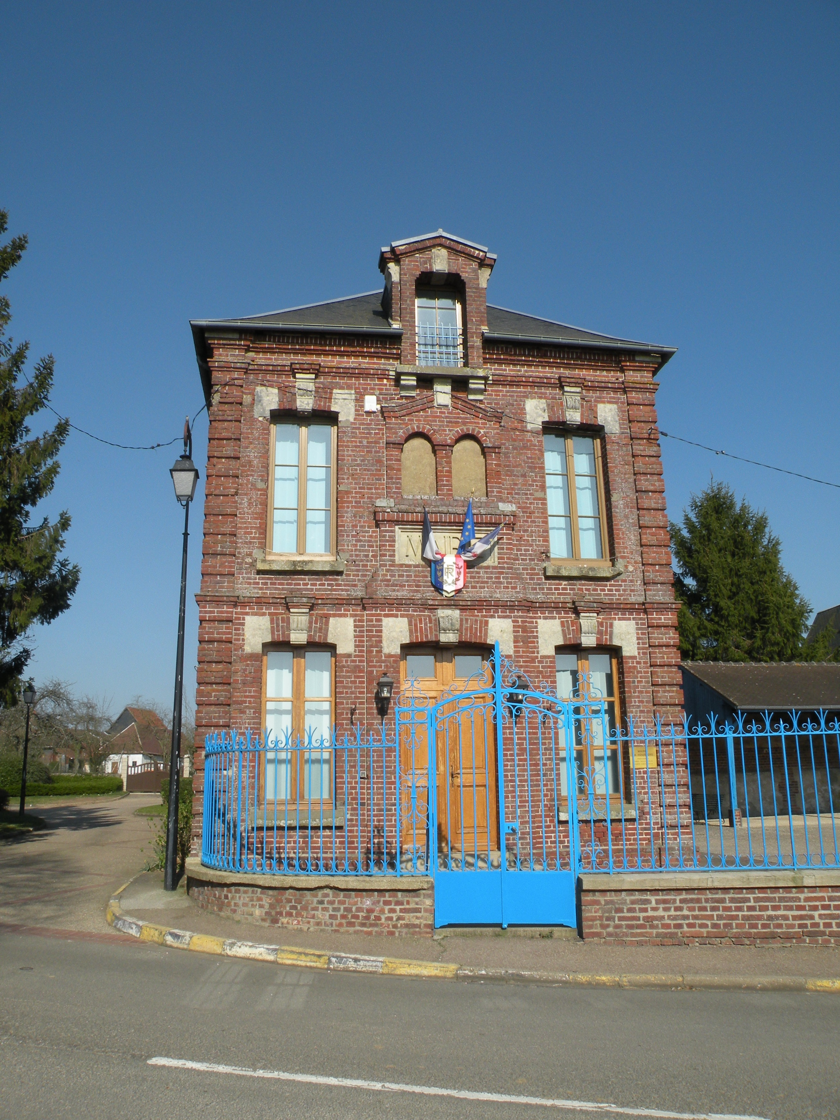 La Houssoye mairie